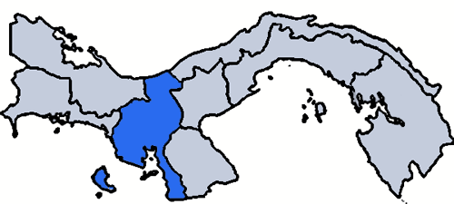 Mappa della diocesi cattolica di Santiago de Veraguas, nello stato centramericano di Panama.